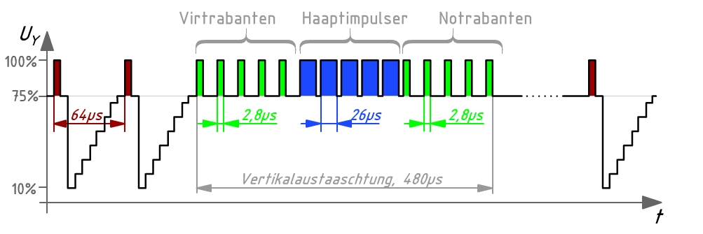 Dëst Bild weist d'BAS-Signal mam Vertikalsignal